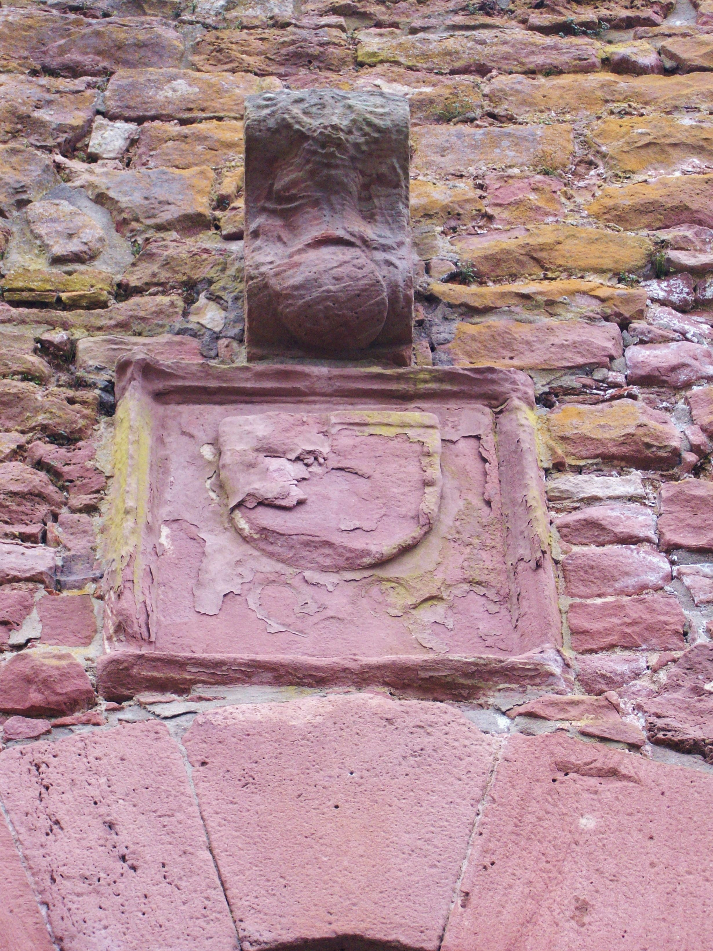 Wappenstein der Grafen von Wertheim am Tor zum Eingang der Kernburg von Burg Freudenburg am Main (um 1500). Die Wappenviertel sind vertauscht.